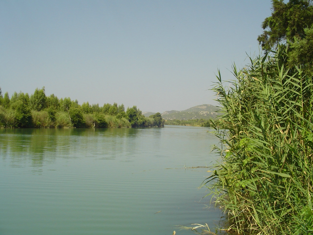 near Dalaman